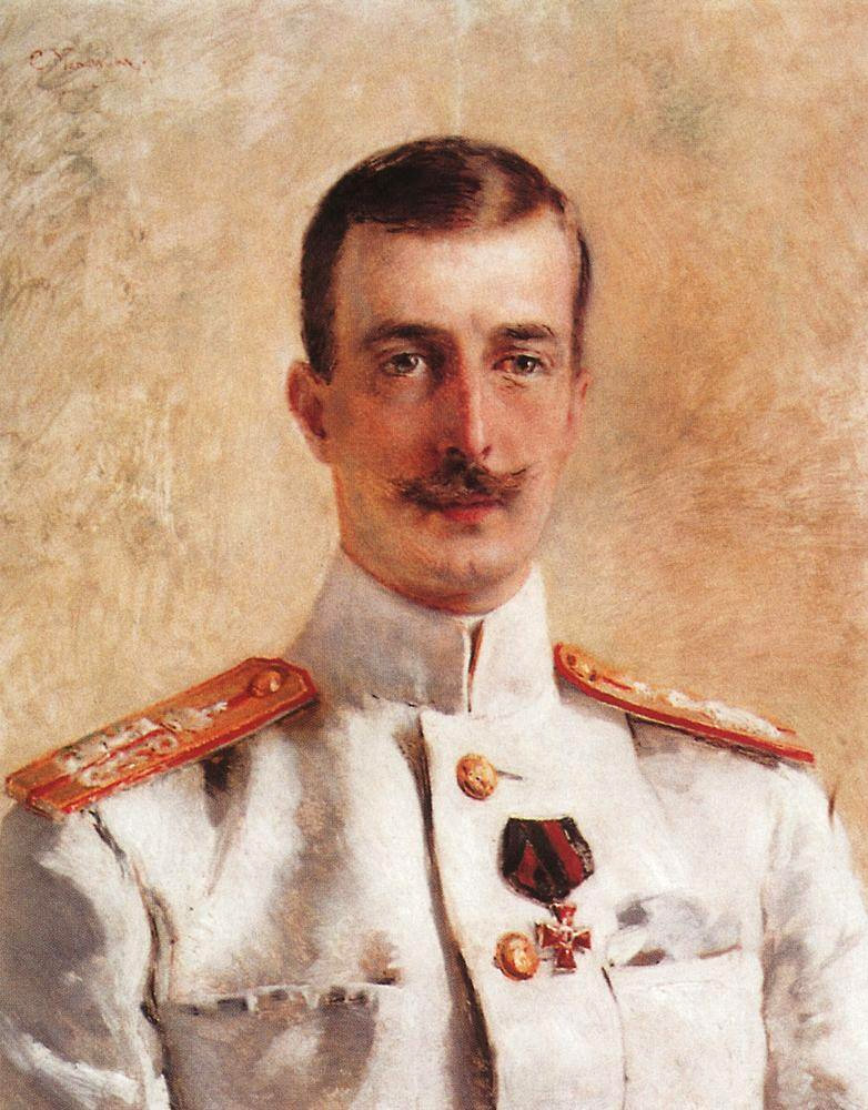 Kirill Vladimirovich